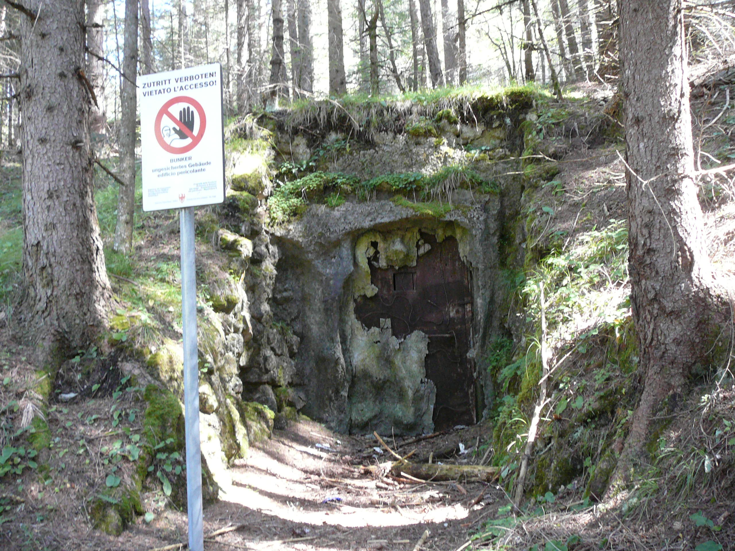 Ingresso Opera 2 Landro nord